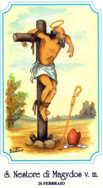 Immagine devozionale raffigurante San Nestore di Magydos